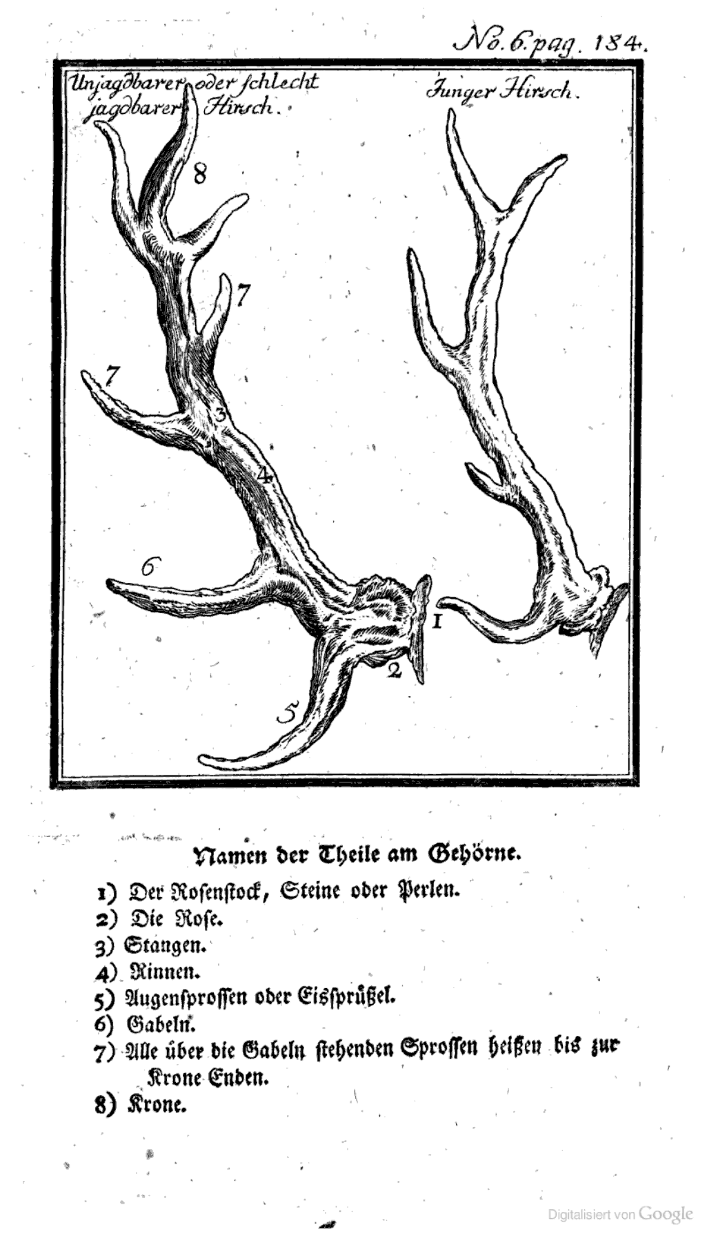 Illustration der Namen der Teile eines Geweihes